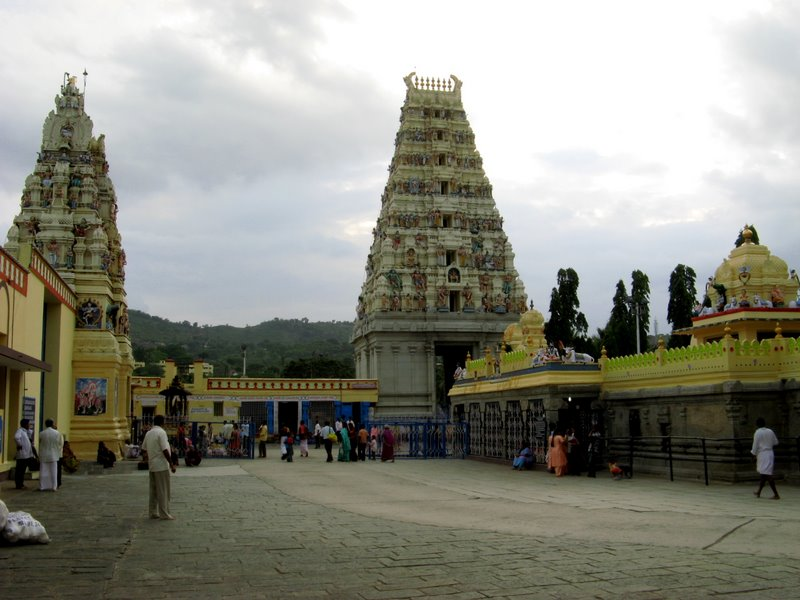 ಕನ್ನಡ: ಶ್ರೀ ಮಲೆ ಮಹದೇಶ್ವರ - ಮುಖ ಪಶ್ಚಿಮ ದ್ವಾರ